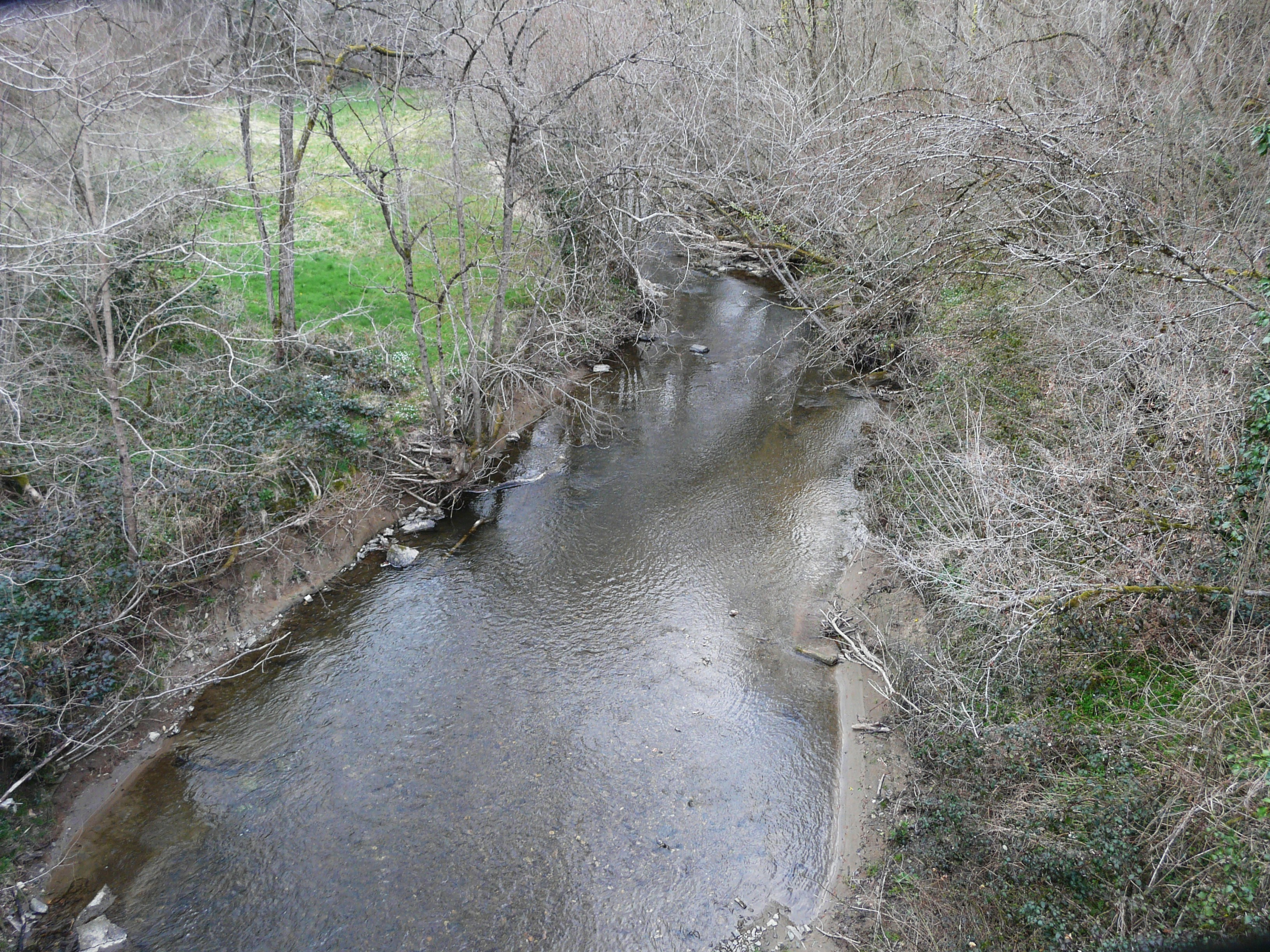 Ruisseau le Lavaud au pont proche du moulin de Boueix, en limite de Nanthiat (à gauche) et Sarrazac (à droite), Dordogne, France. Vue prise en direction de l'aval.